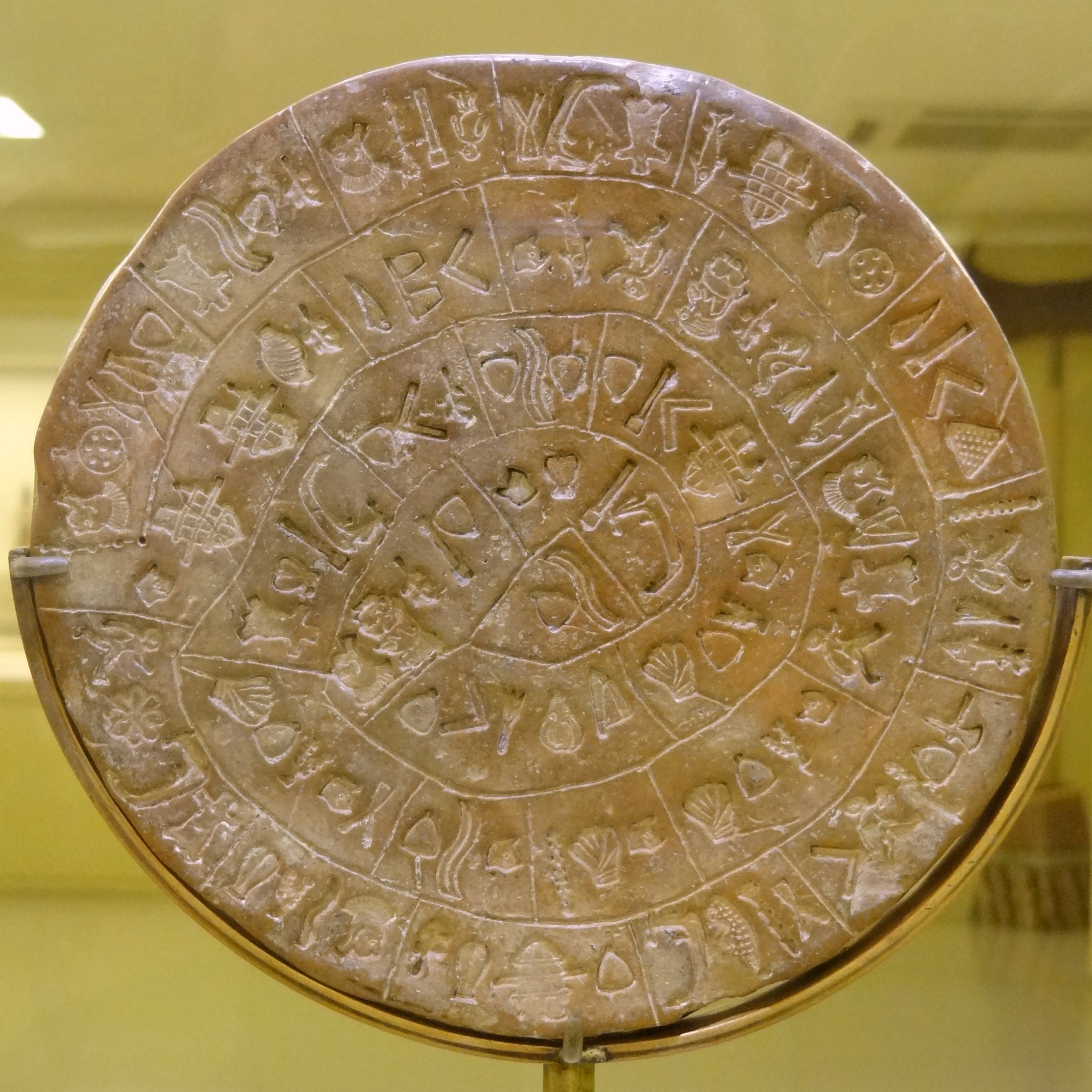 Der am 3. Juli 1908 in der Ausgrabungsstätte von Phaistos gefundene Diskos von Phaistos (Seite B), ausgestellt im Archäologischen Museum Iraklio, Kreta, Griechenland